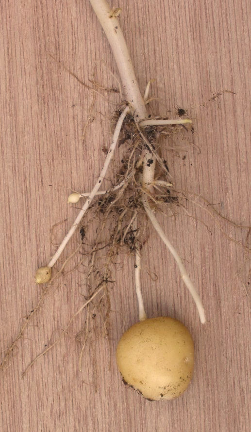 zelfgemaakt foto van stolenen bij aardappel